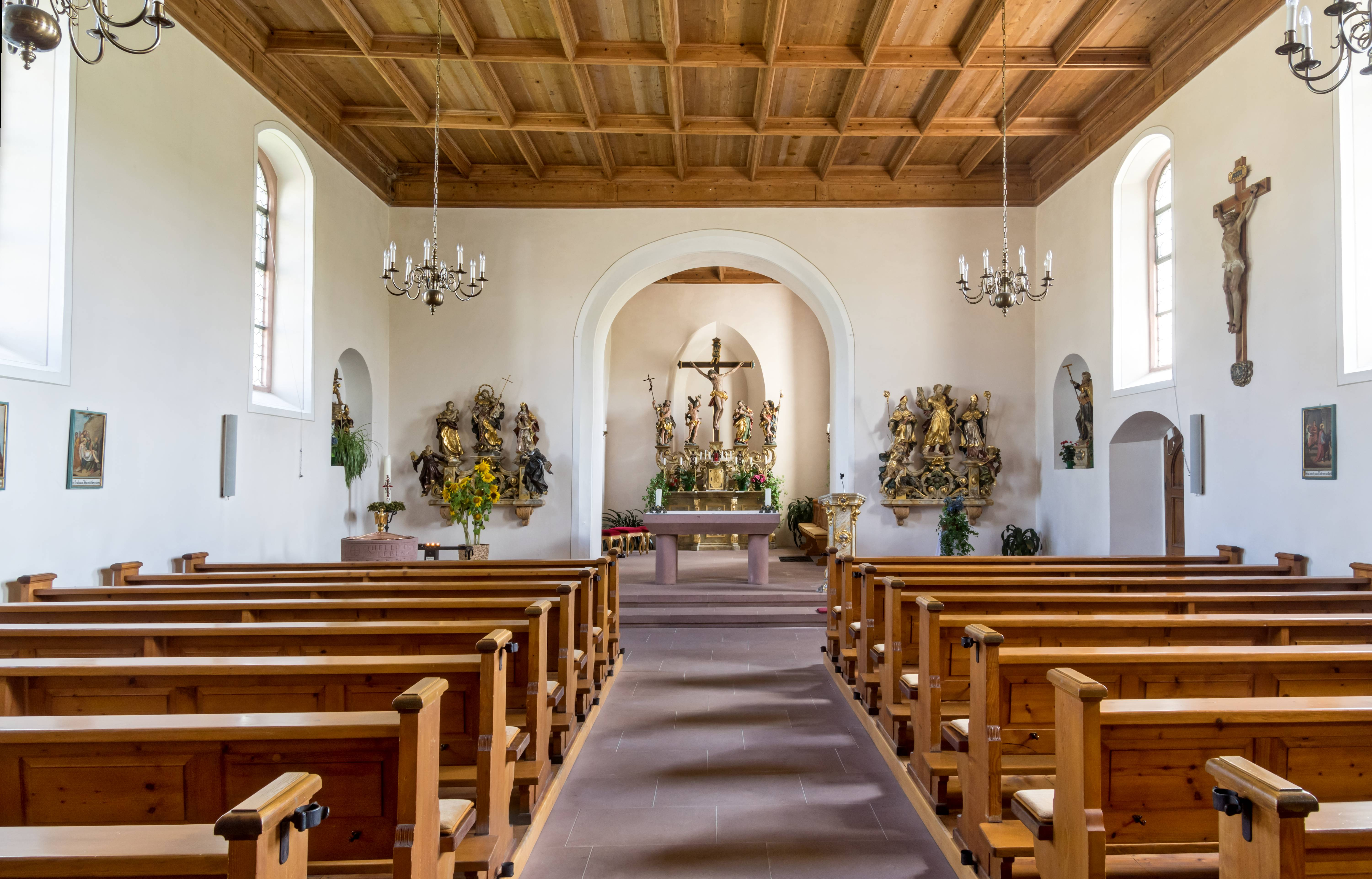 St. Andreas in Furtwangen Neukirch Blick zum Altar